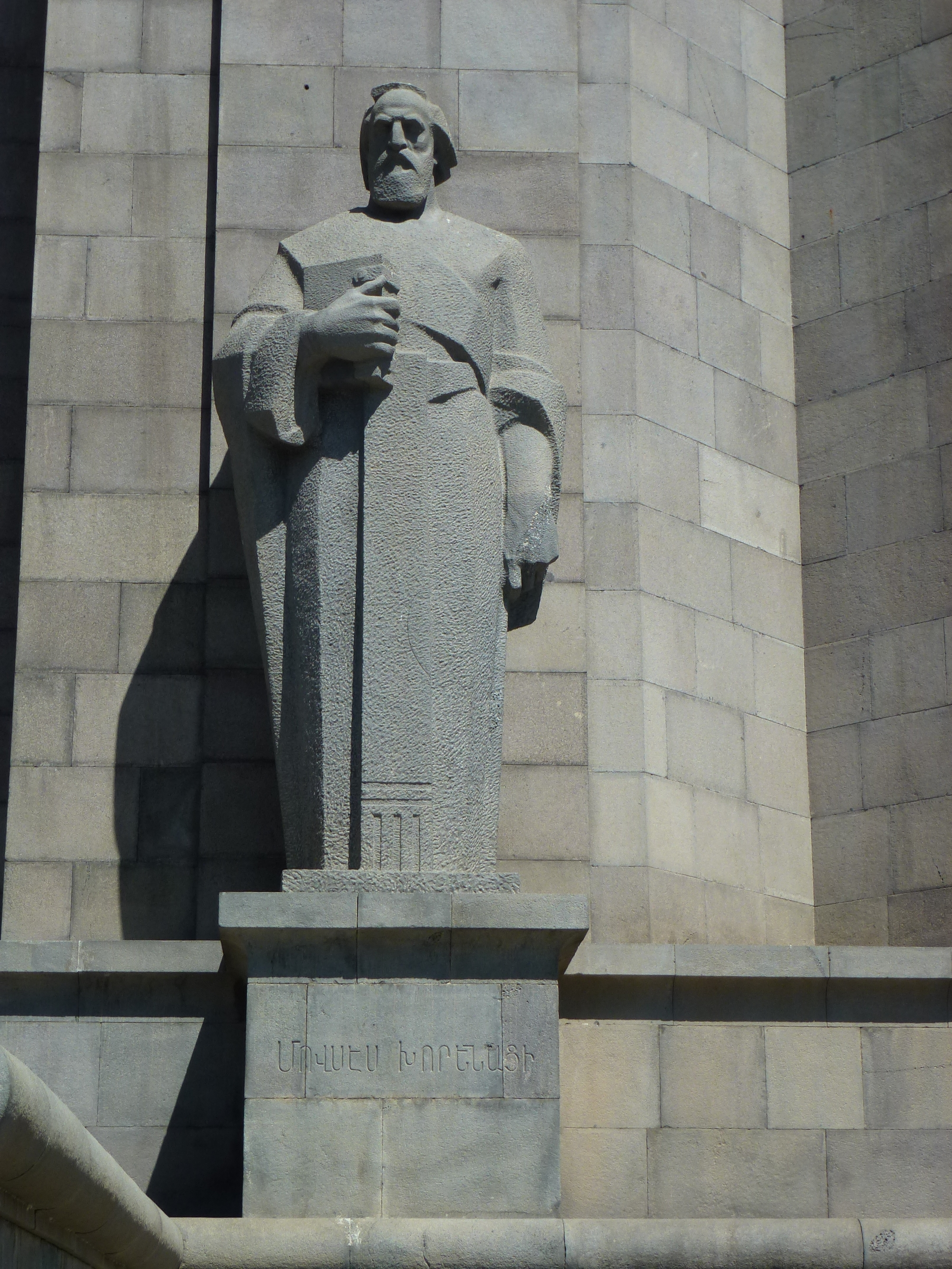 Մովսես Խորենացու արձանը Մատենադարանում 6/81.8